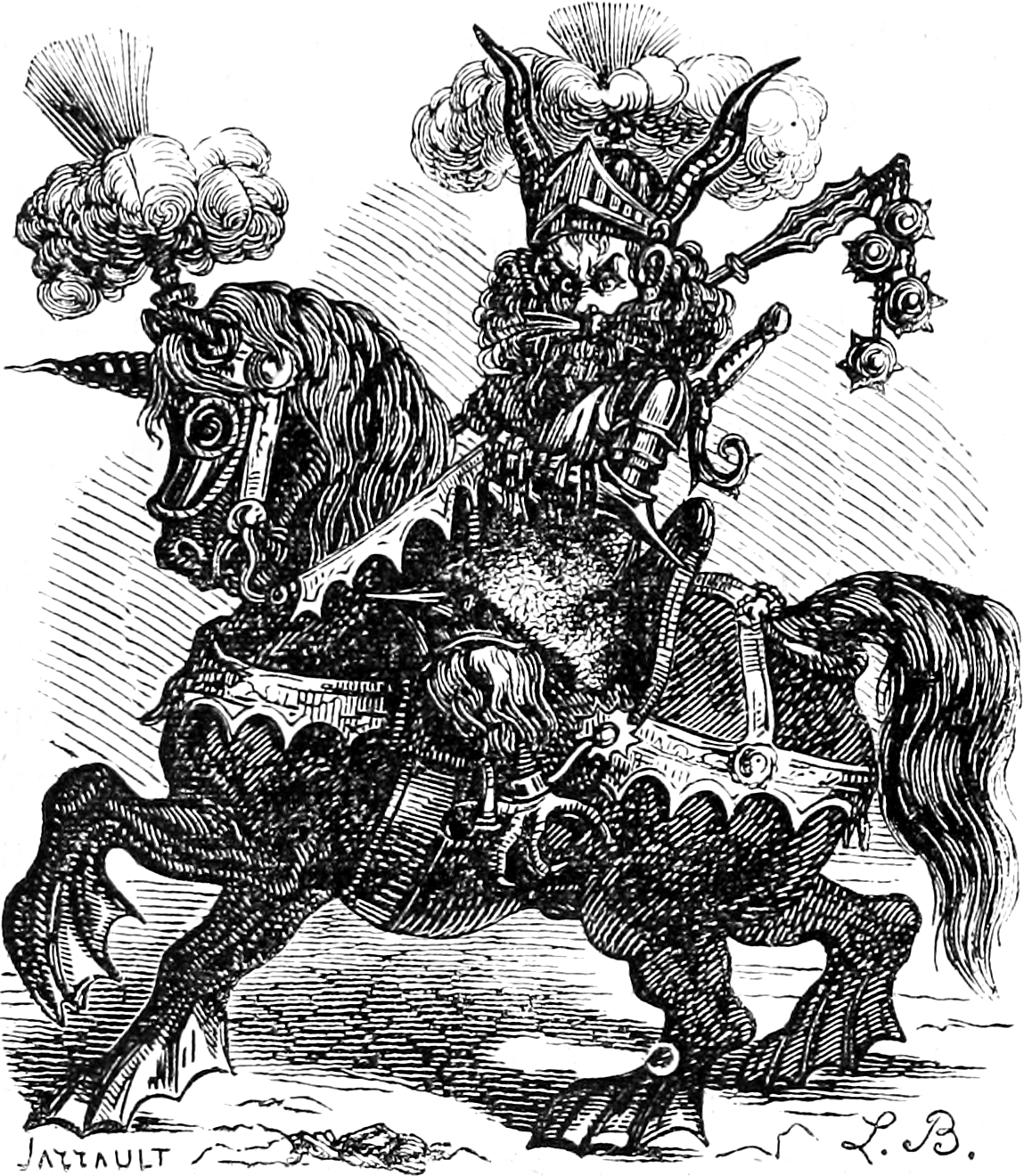 Une illustration pour l’article Alocer dans le Dictionnaire infernal par Collin de Plancy.